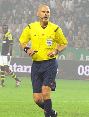 Referee Michael Lerjéus